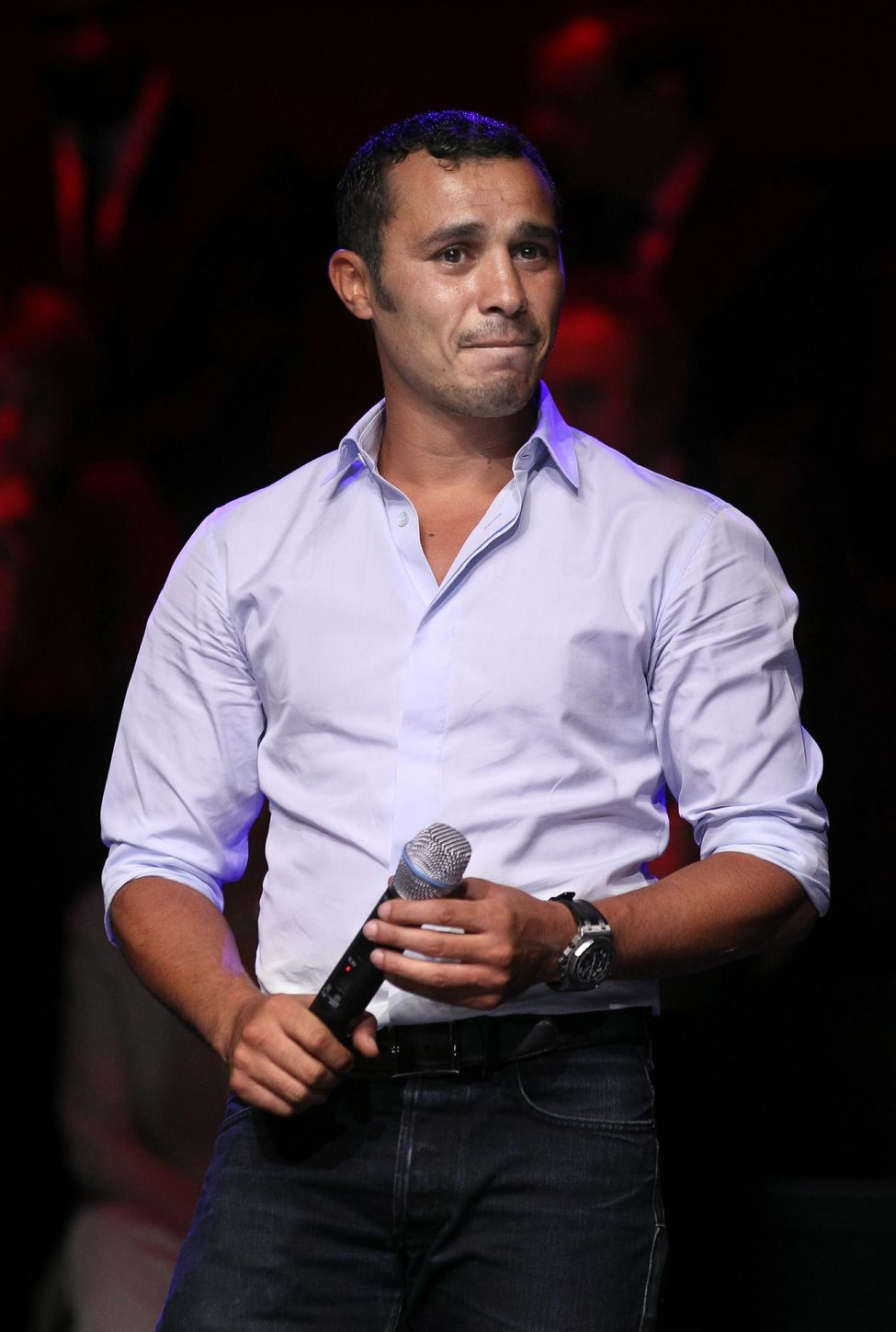 Brahim Asloum à Paris le 2 septembre 2011.